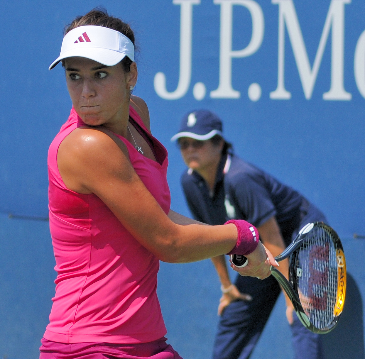 Sorana Cîrstea - US Open 2010